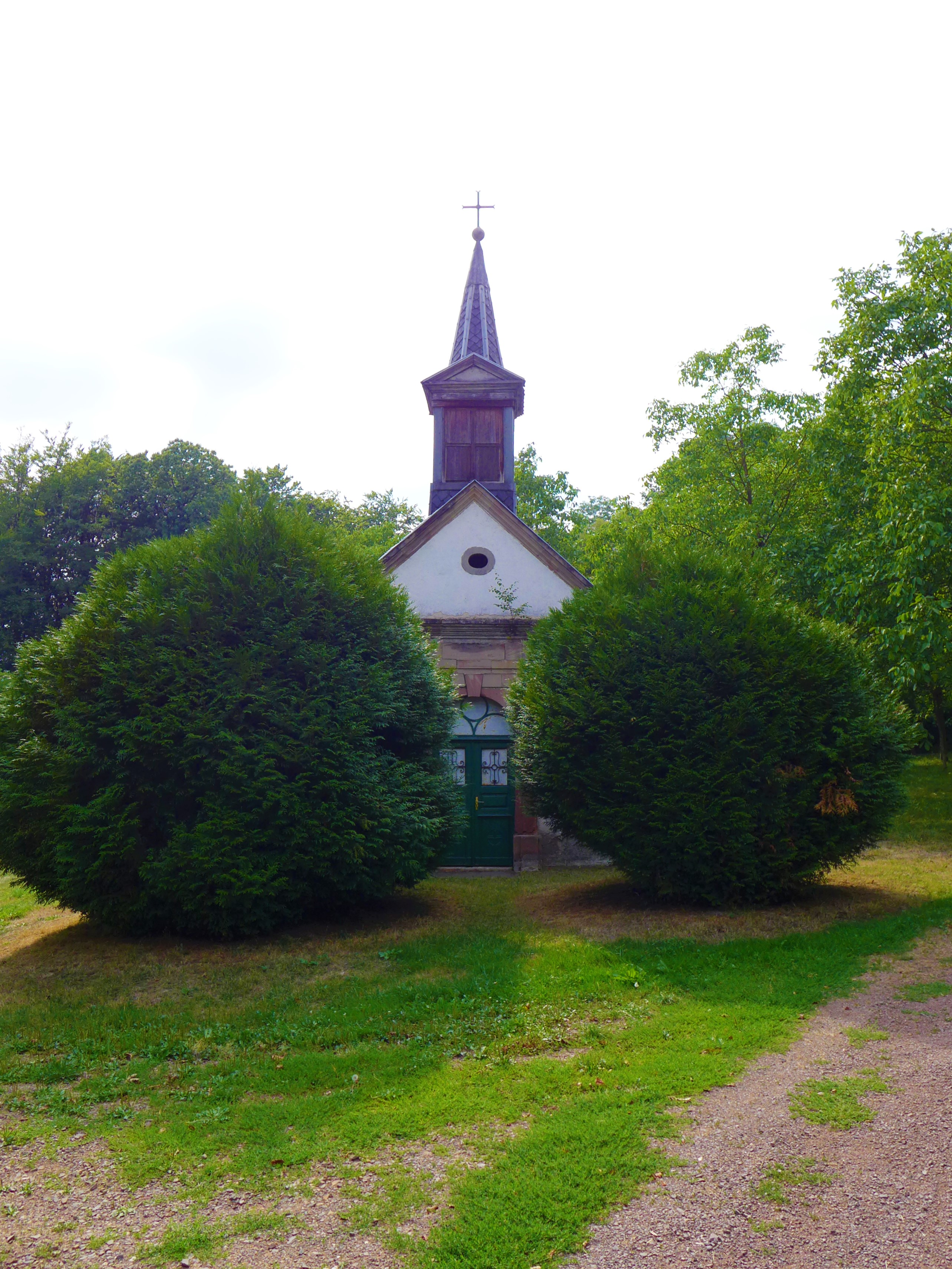 Wallerfangen, Kapelle Hof Limberg